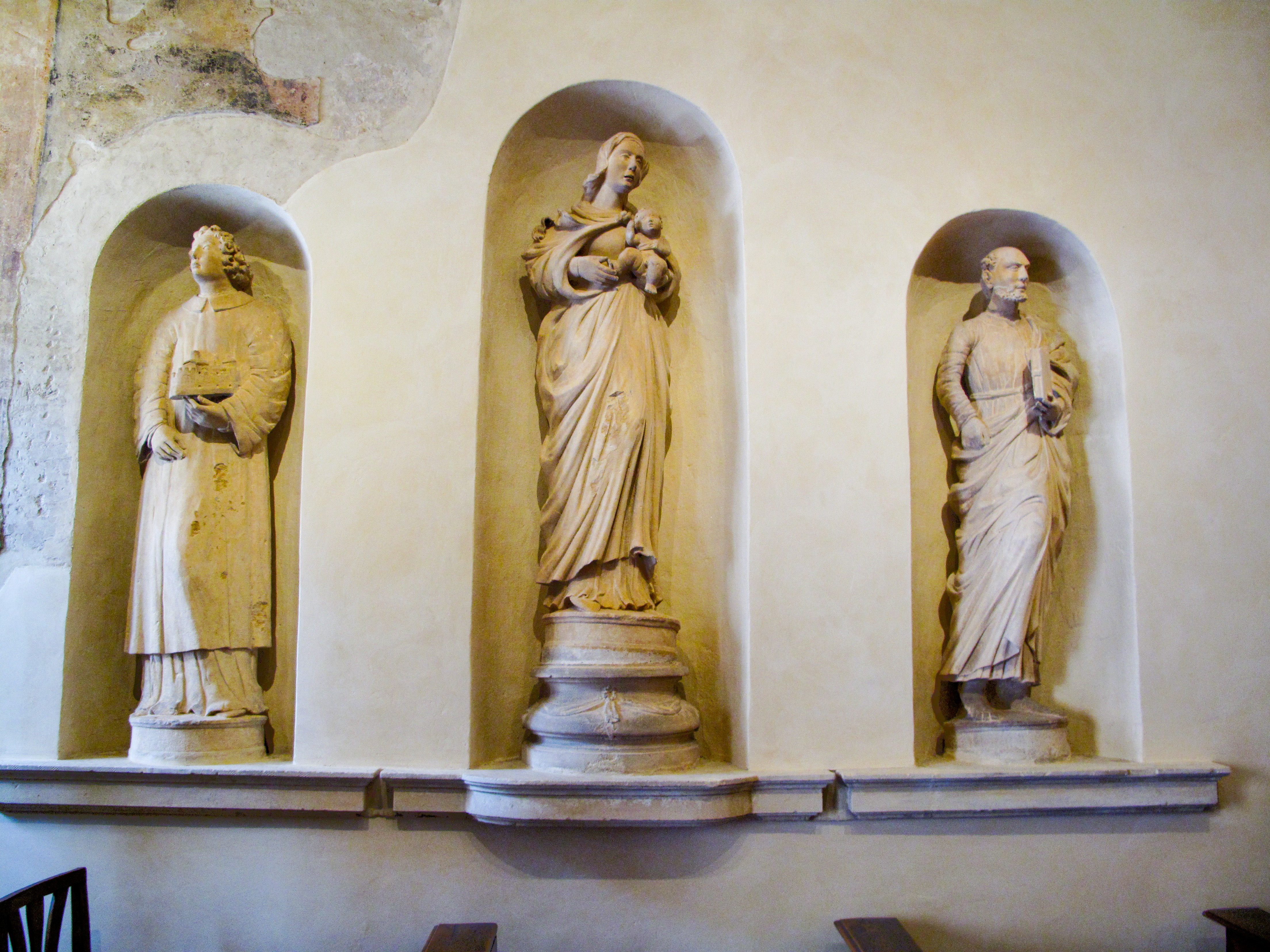 Vicenza - Chiesa di San Vincenzo - Vicenza - Antiche statue della facciata